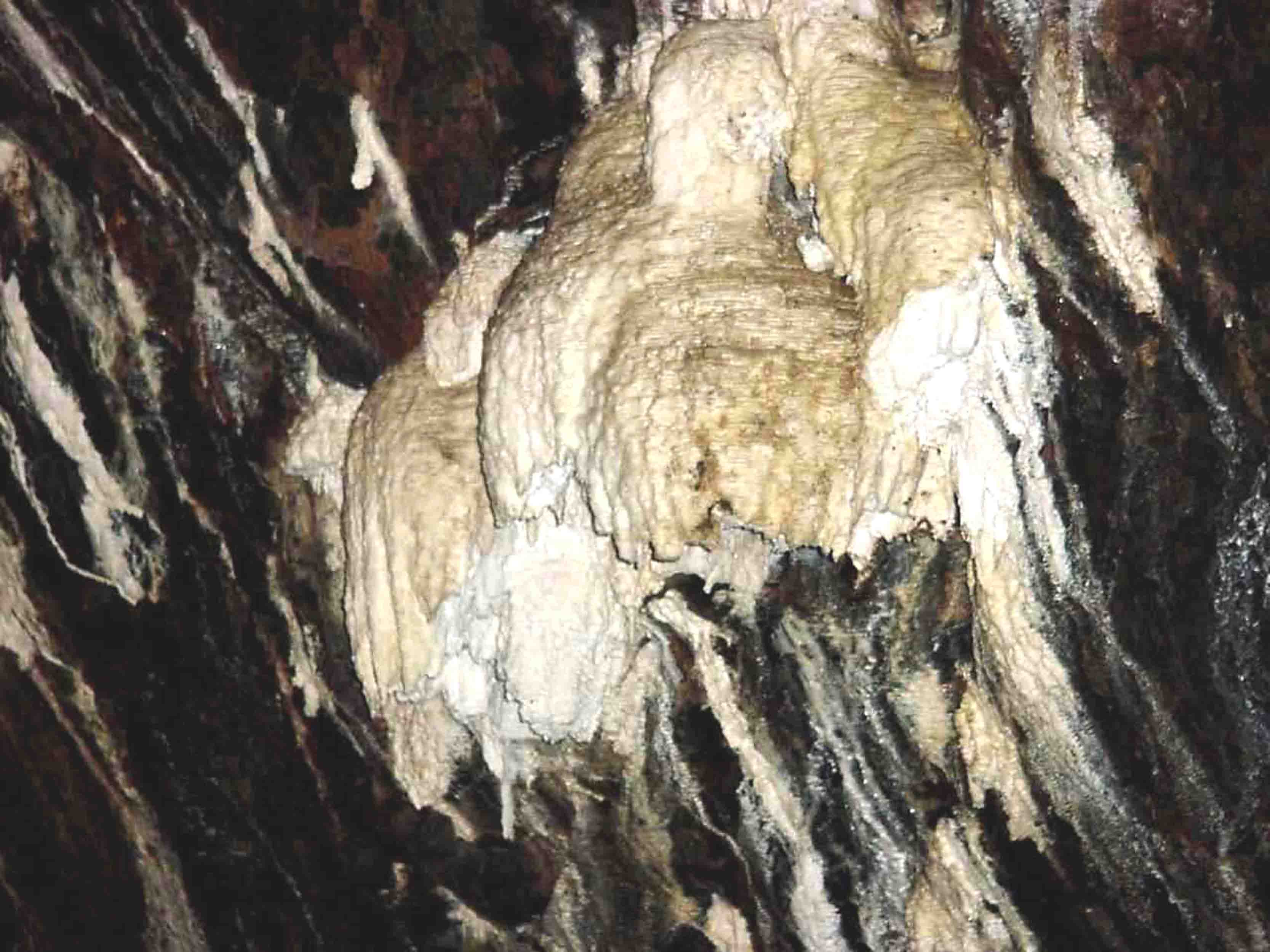 Formações de estalactites no Algar do Carvão, Ilha Terceira, Açores - Portugal.